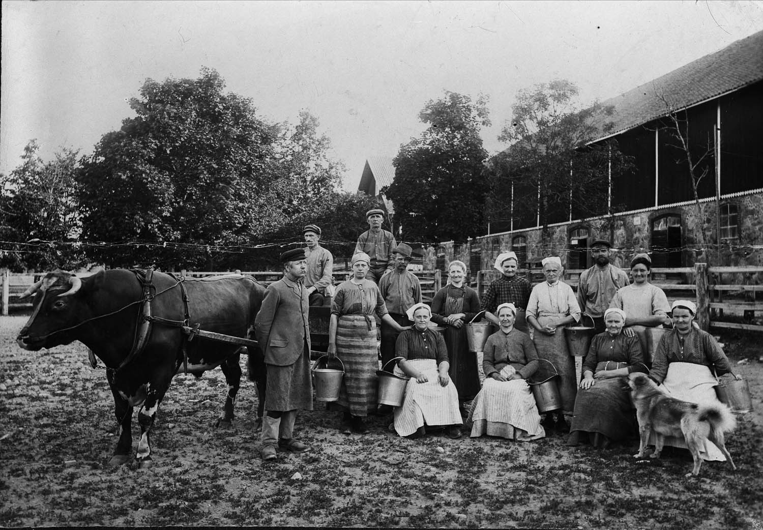 Statare. Mjölkerskor och lagårdskarlar uppställda vid ladugården. Julita gård, Södermanland. Annat: Utsikt över: Sverige (SE), Södermanland, Oppunda hd, Julita, Julita gård